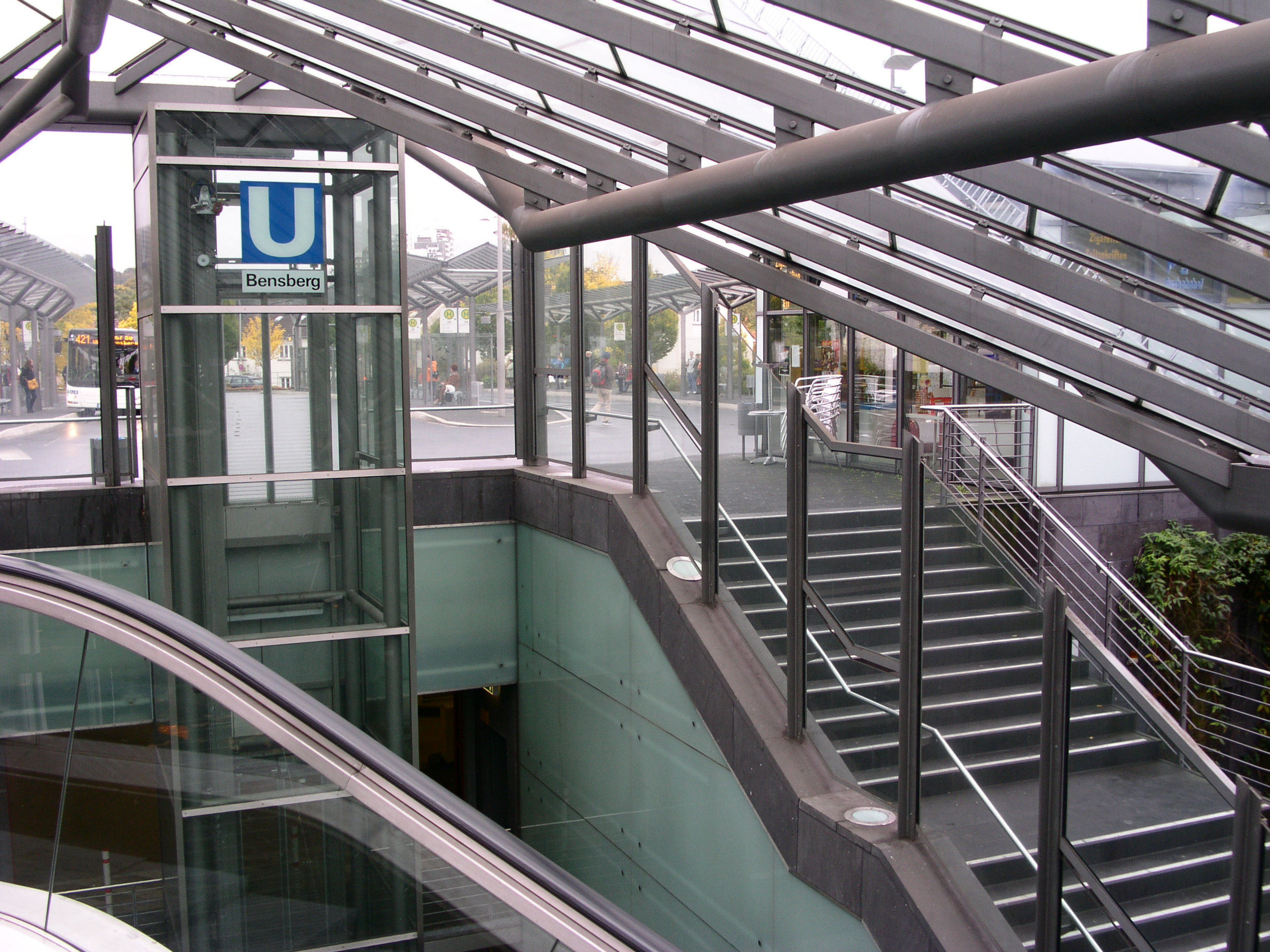 Zugang zur U-Bahn-Station in Bensberg